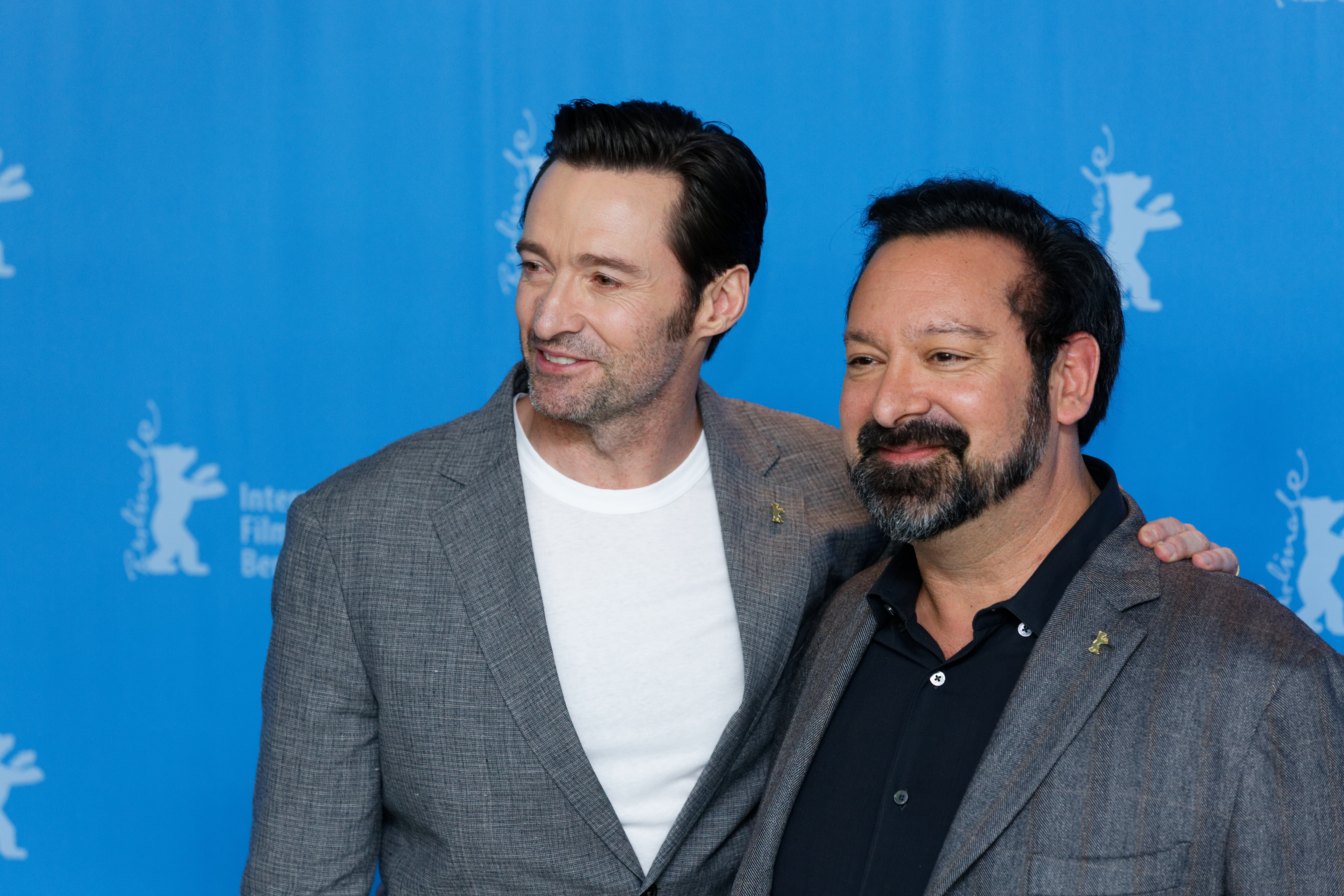 Hugh Jackman und James Mangold beim Photo Call zu Logan bei der Berlinale 2017